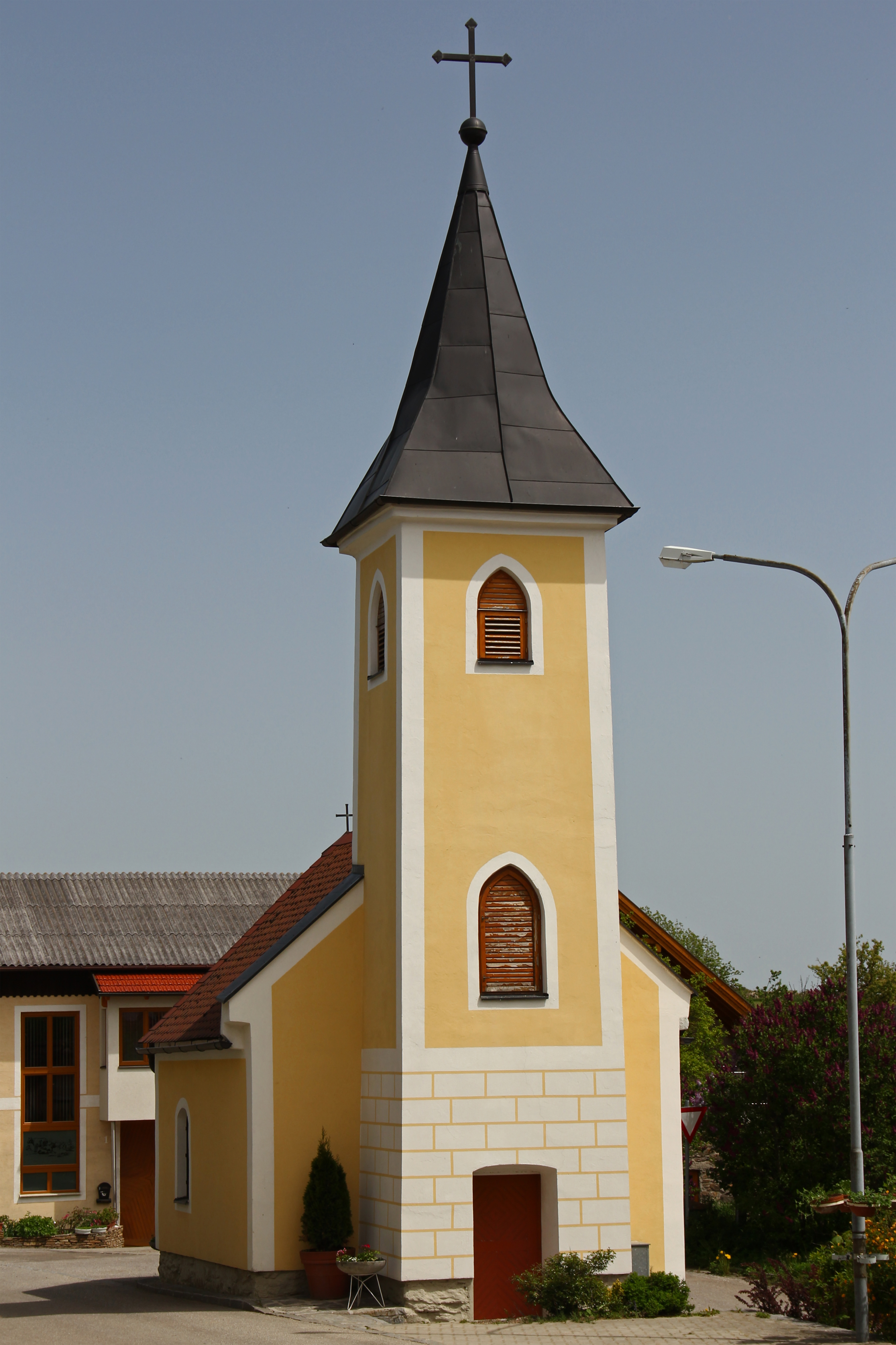 Dreifaltigkeitskapelle mit Rundschluss und vorgestelltem Turm mit Pyramidenhelm. Kleiner, barocker Altar aus dem 18. Jahrhundert. Spätgotische Figuren aus der zweiten Hälfte des 15.; spätbarocke Heiligenfiguren aus der zweiten Hälfte des 18. Jahrhunderts.